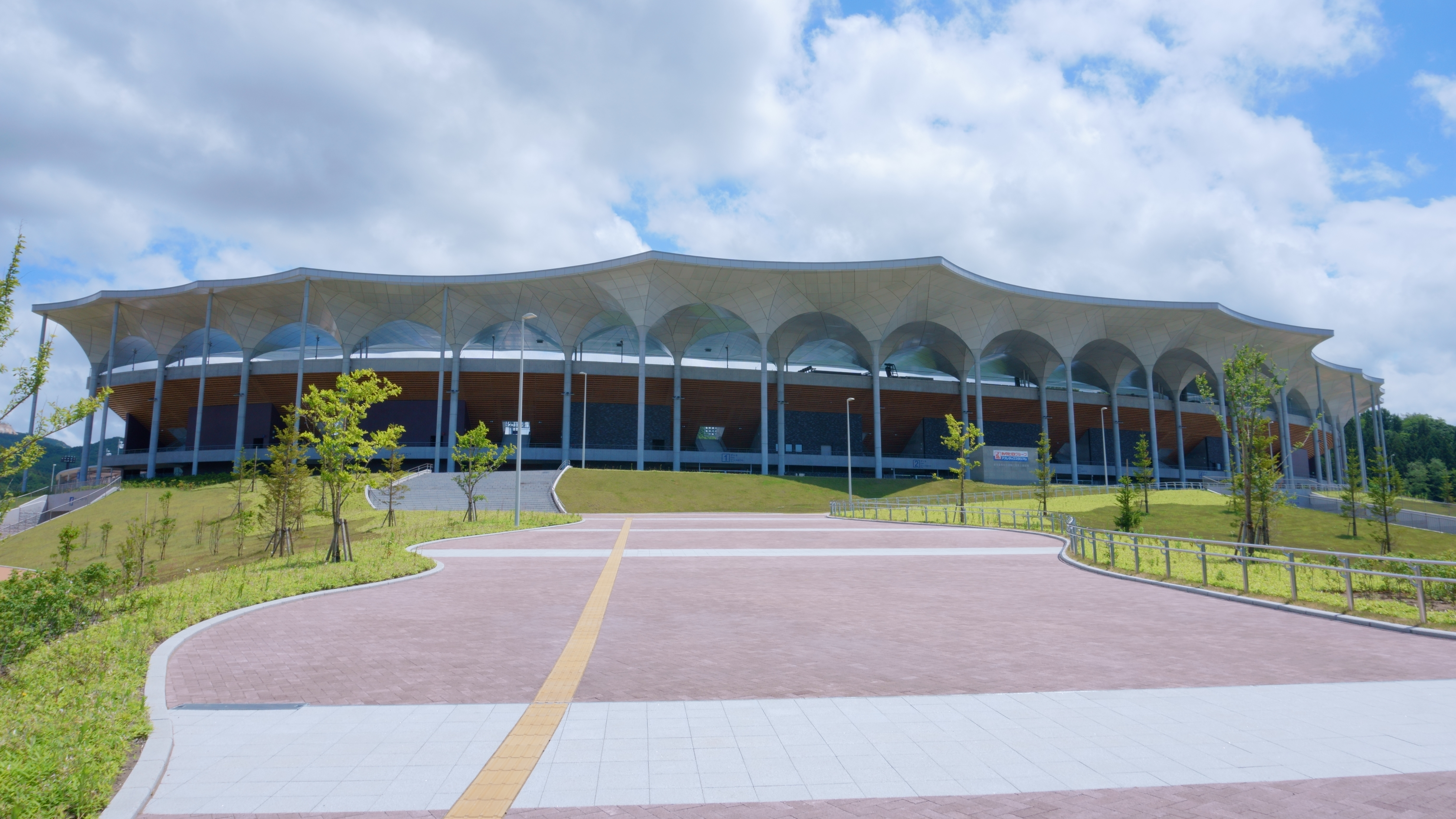 新青森県総合運動公園陸上競技場。伊藤豊雄の設計によるスタジアムで、スタジアム外観は曲面的なパネルの組み合わせによる大屋根が目を引く。